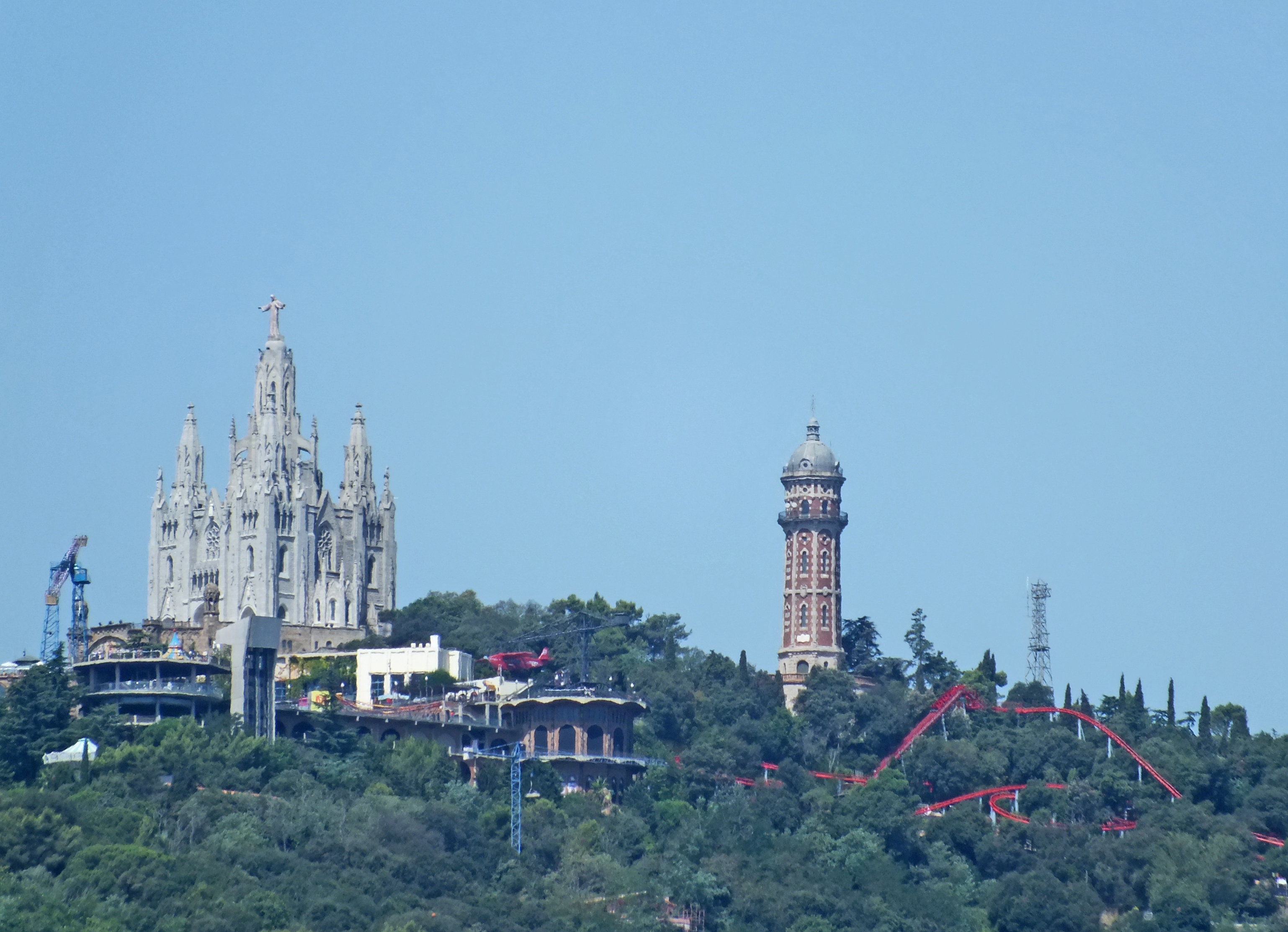 Tibidabo